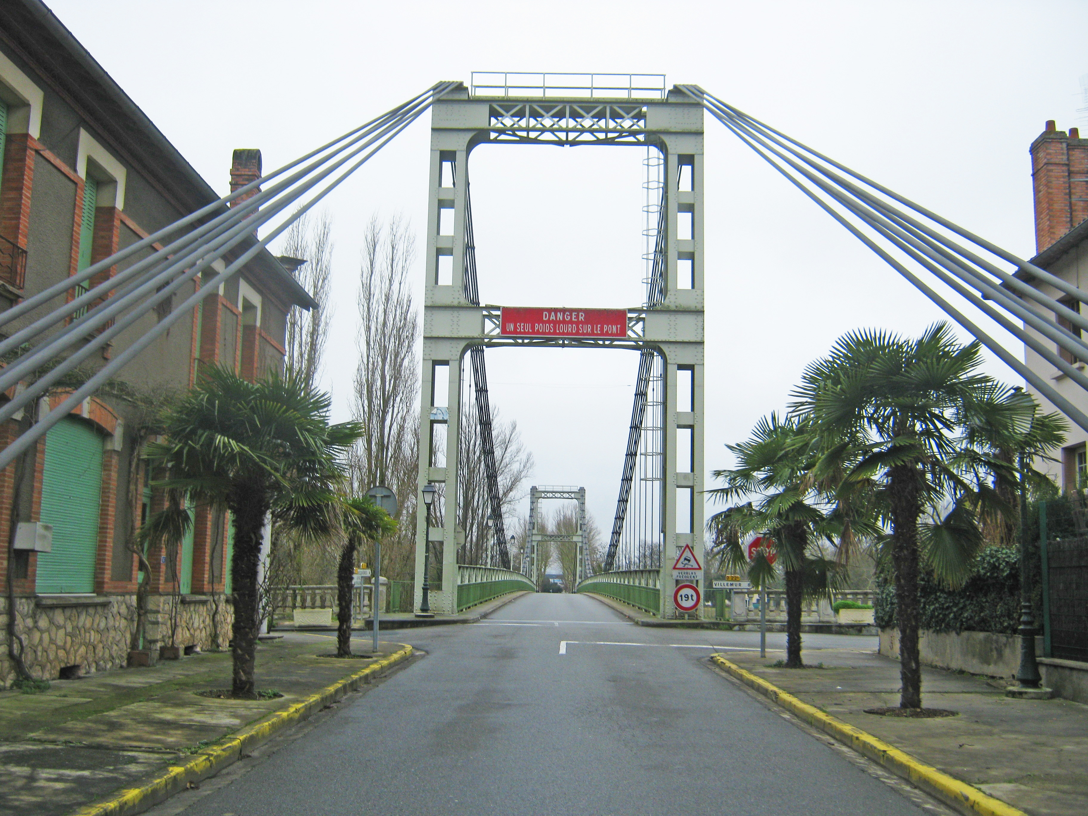 Photo du Pont de Mirepoix sur le Tarn